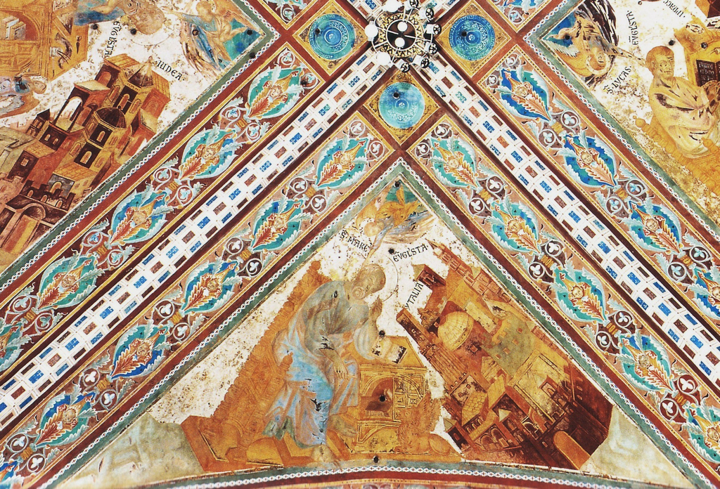 Cimabue, san marco